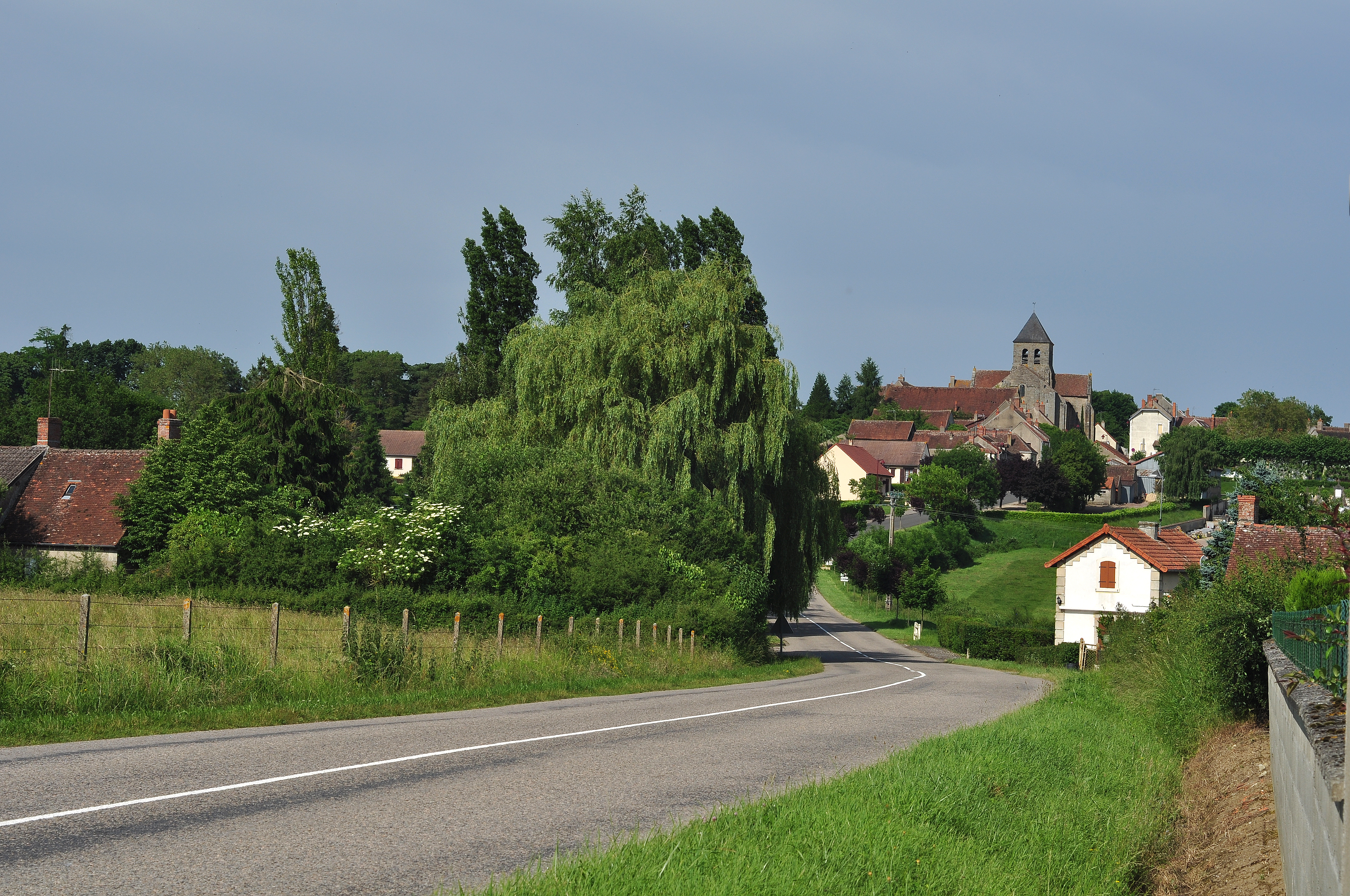 Vue de COULEUVRE à partir de la route D3 venant de CERILLY.